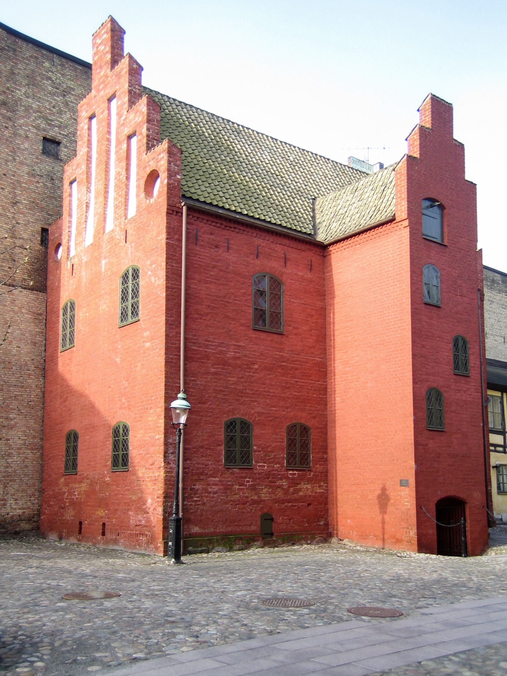 Kompanihuset, Malmö, Sweden